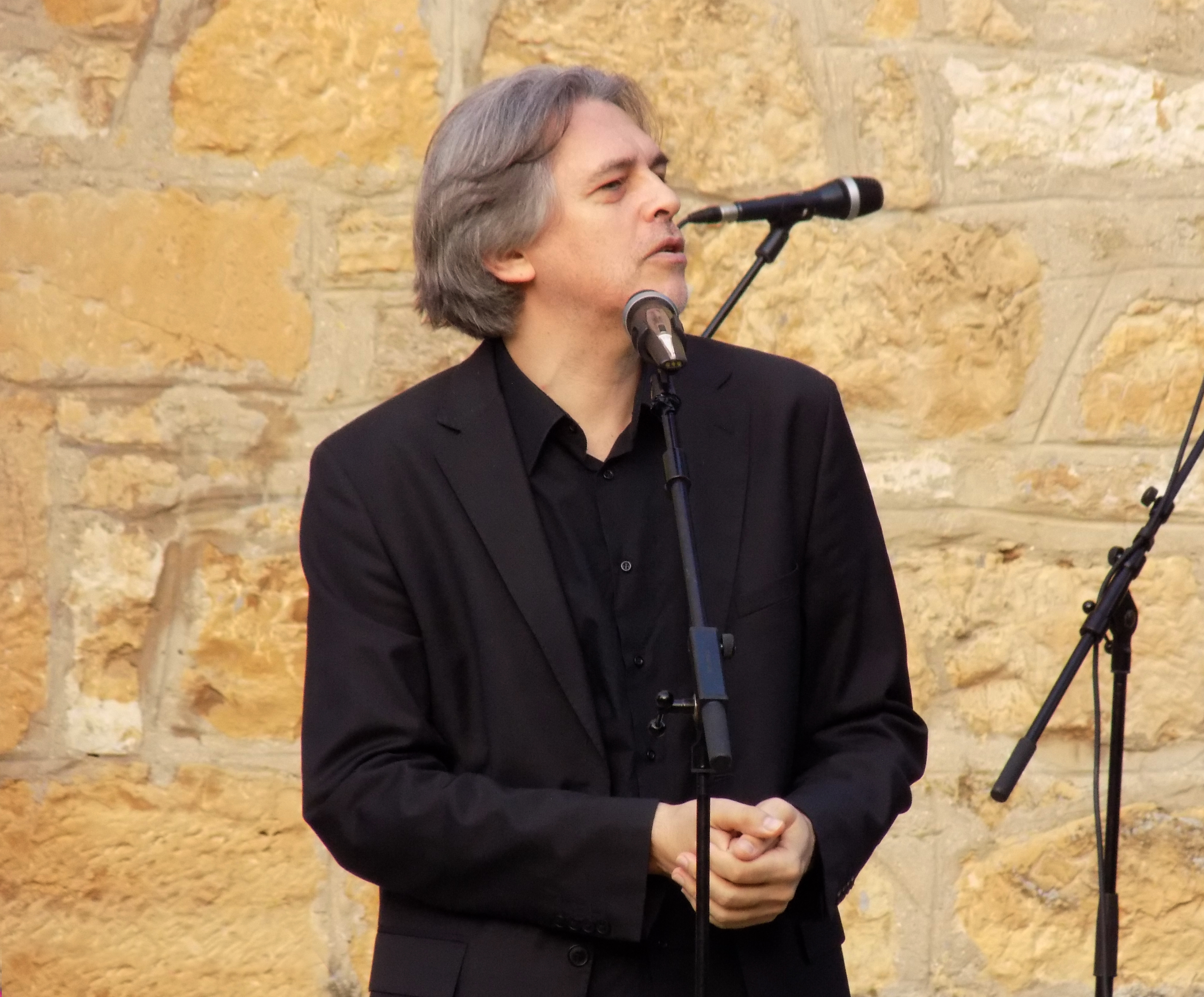 Goran Gocić prilikom dodele nagrade "Moma Dimić" tokom programa "Petrovdan u Nemenikućama", u okviru manifestacije "Dani Milovana Vidakovića", 12. juli 2018